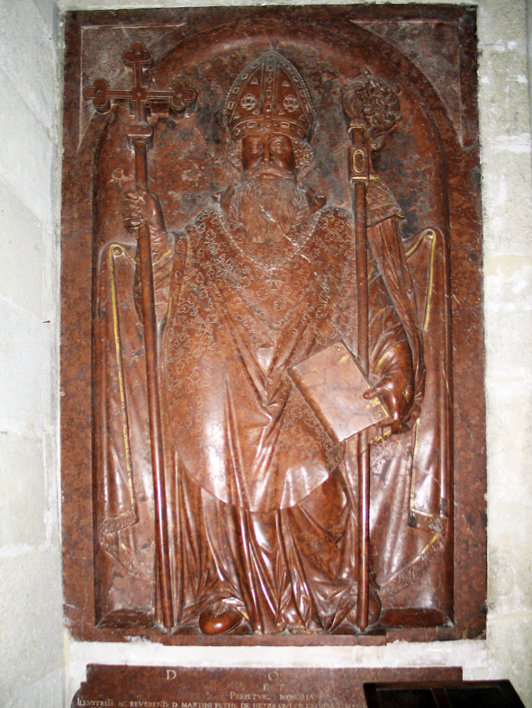 Epitaf Martina Petheho, kaločského arcibiskupa, v bratislavskom Dóme sv. Martina